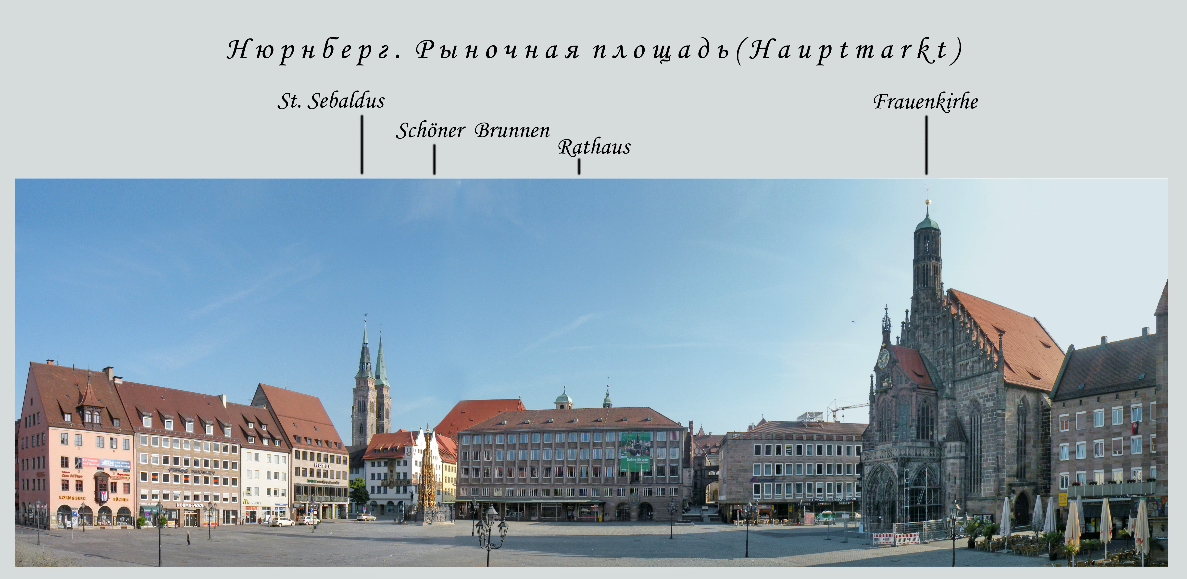 Нюрнберг.Рыночная площадь.